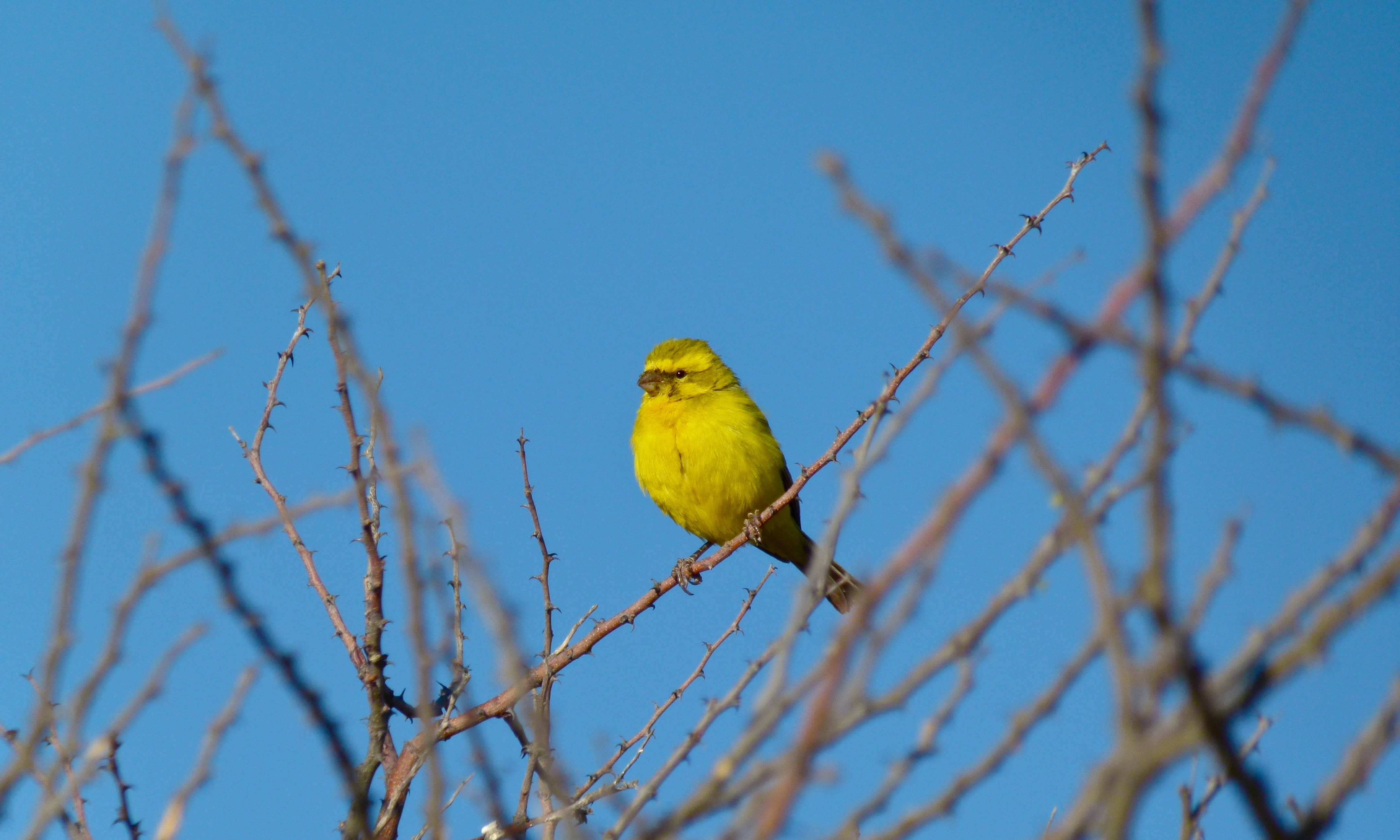 Nossob Riverbed, Kgalagadi Transfrontier Park, SOUTH AFRICA